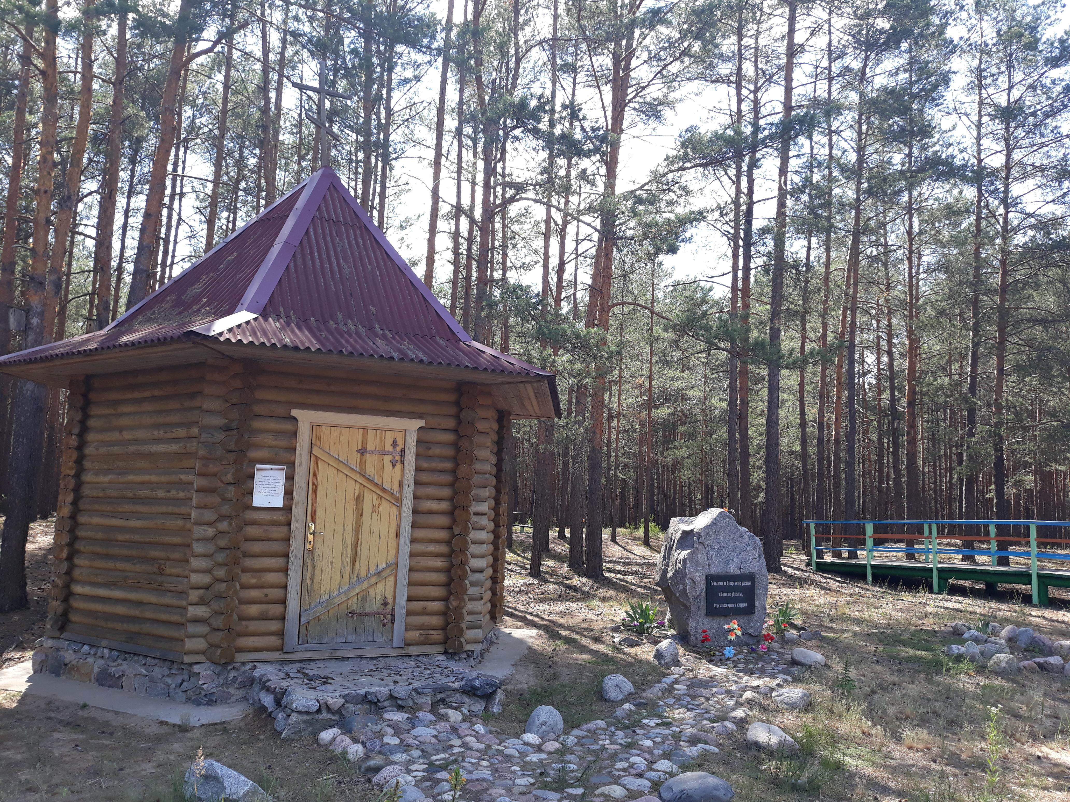 капліца ў мемарыяле Азарычы